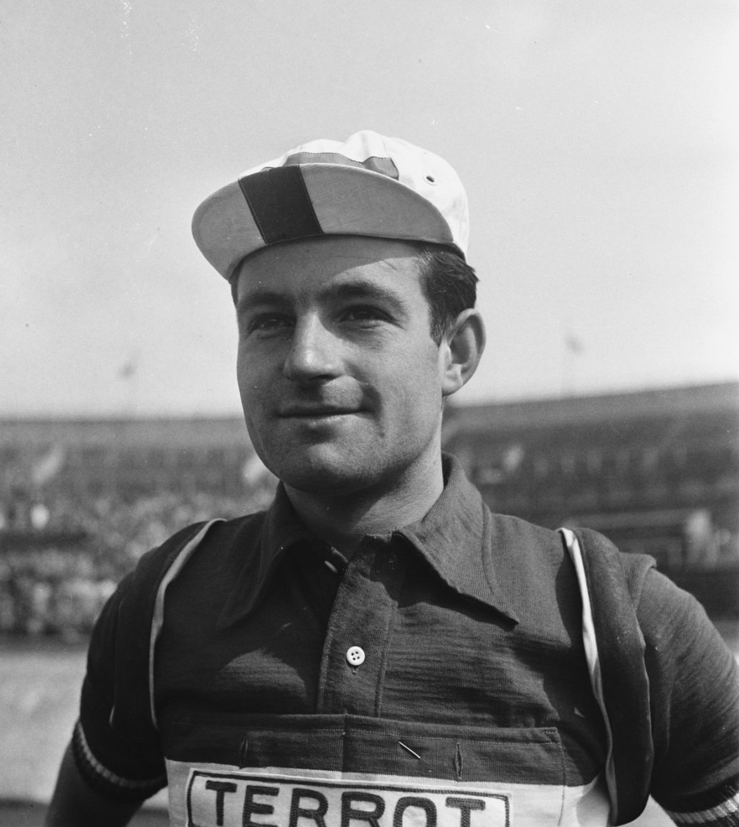 Portretten deelnemers Tour de France, [Jean "Jängy"] Schmit (Luxemburg)